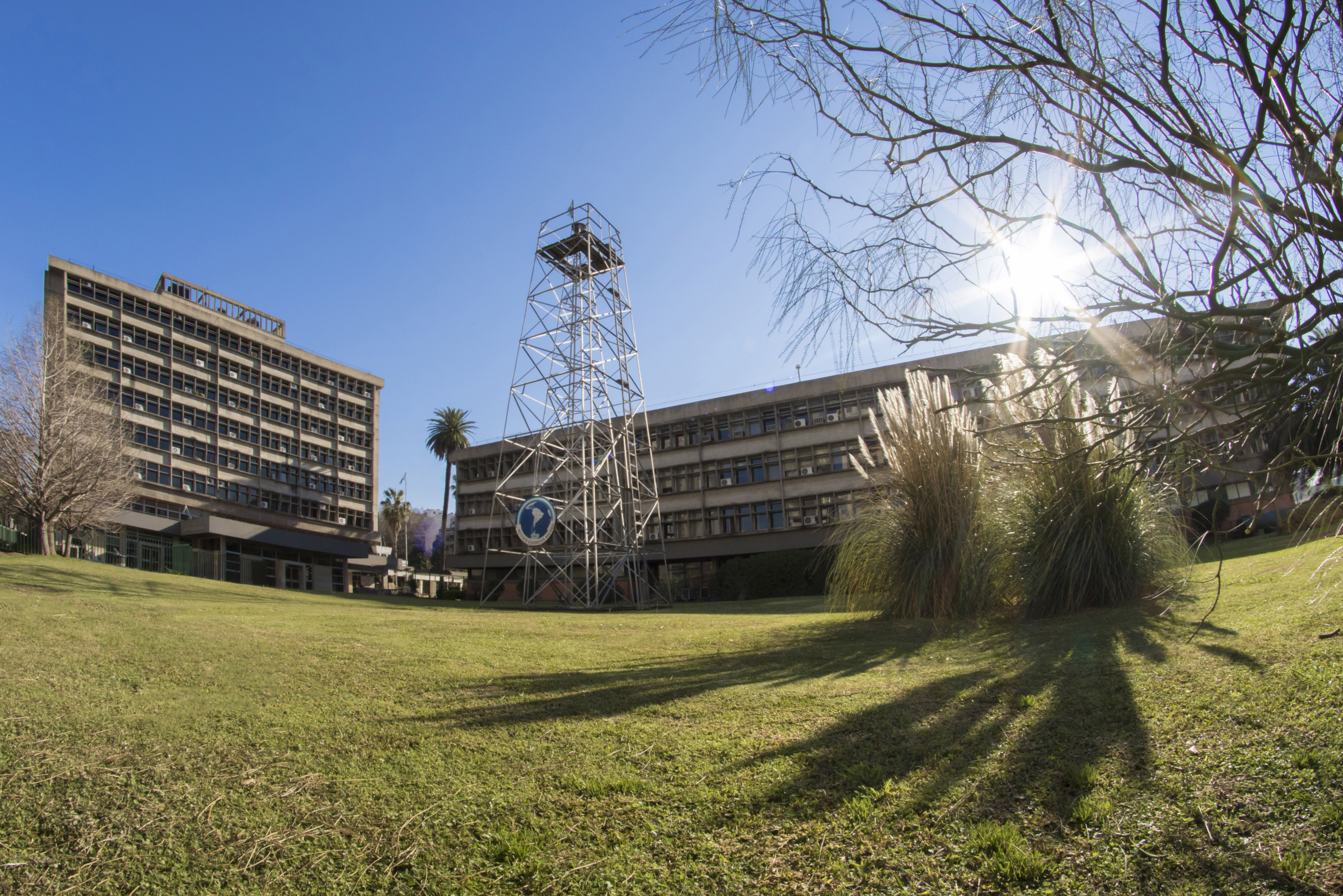 edificios del instituto geográfico nacional